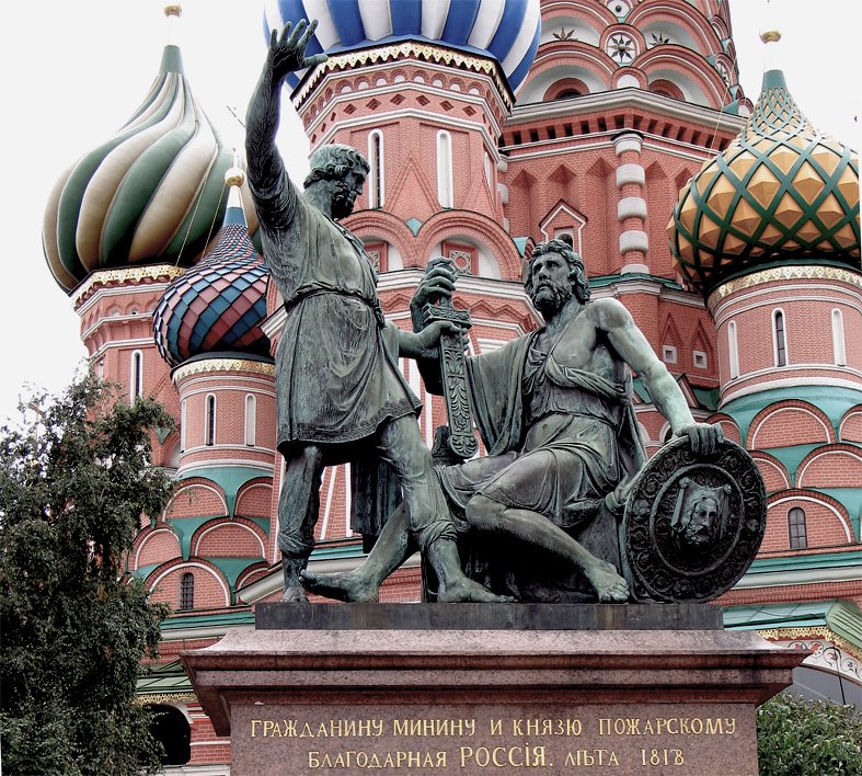 Národní hrdinovia Ruska